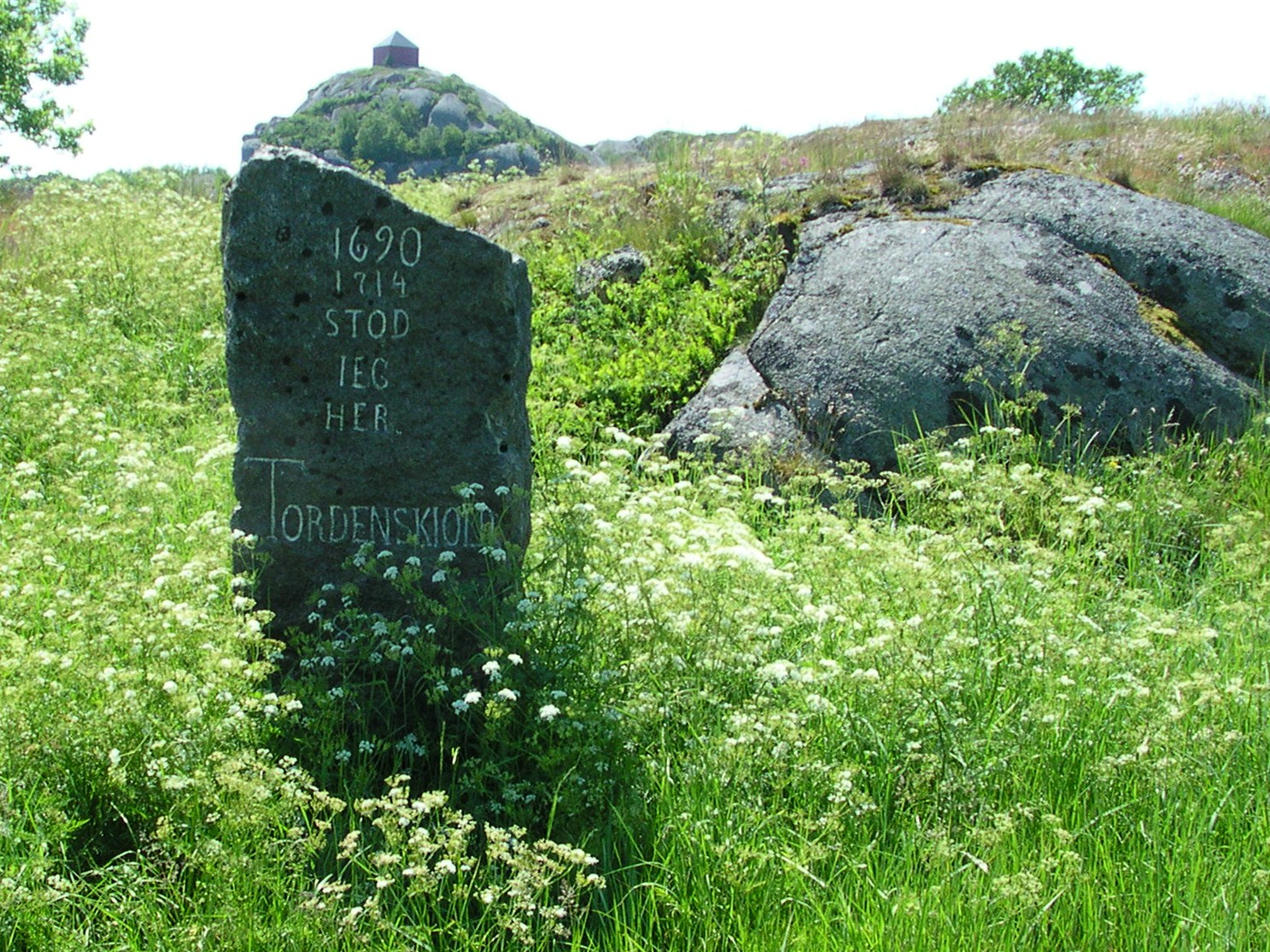 Tordenskjold og Citadelløya